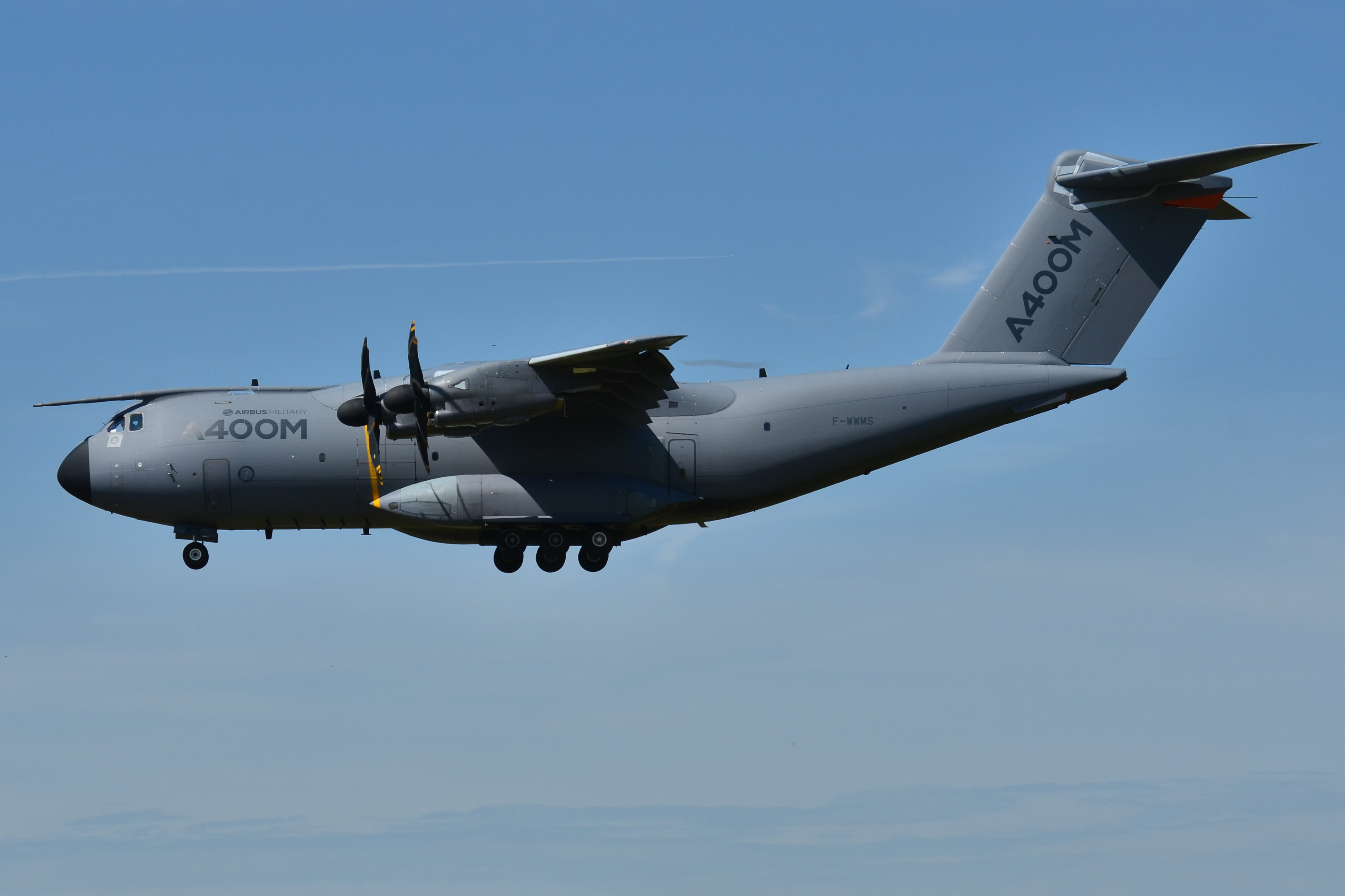 Photo prise à l'aéroport de Toulouse-Blagnac (LFBO) en France. Picture take at Toulouse-Blagnac Airport (LFBO) in France.